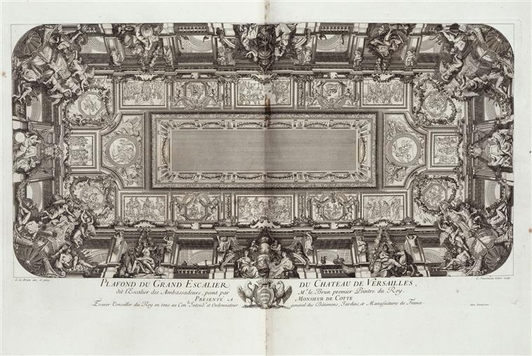 Vue générale du plafond de l’Escalier des Ambassadeurs